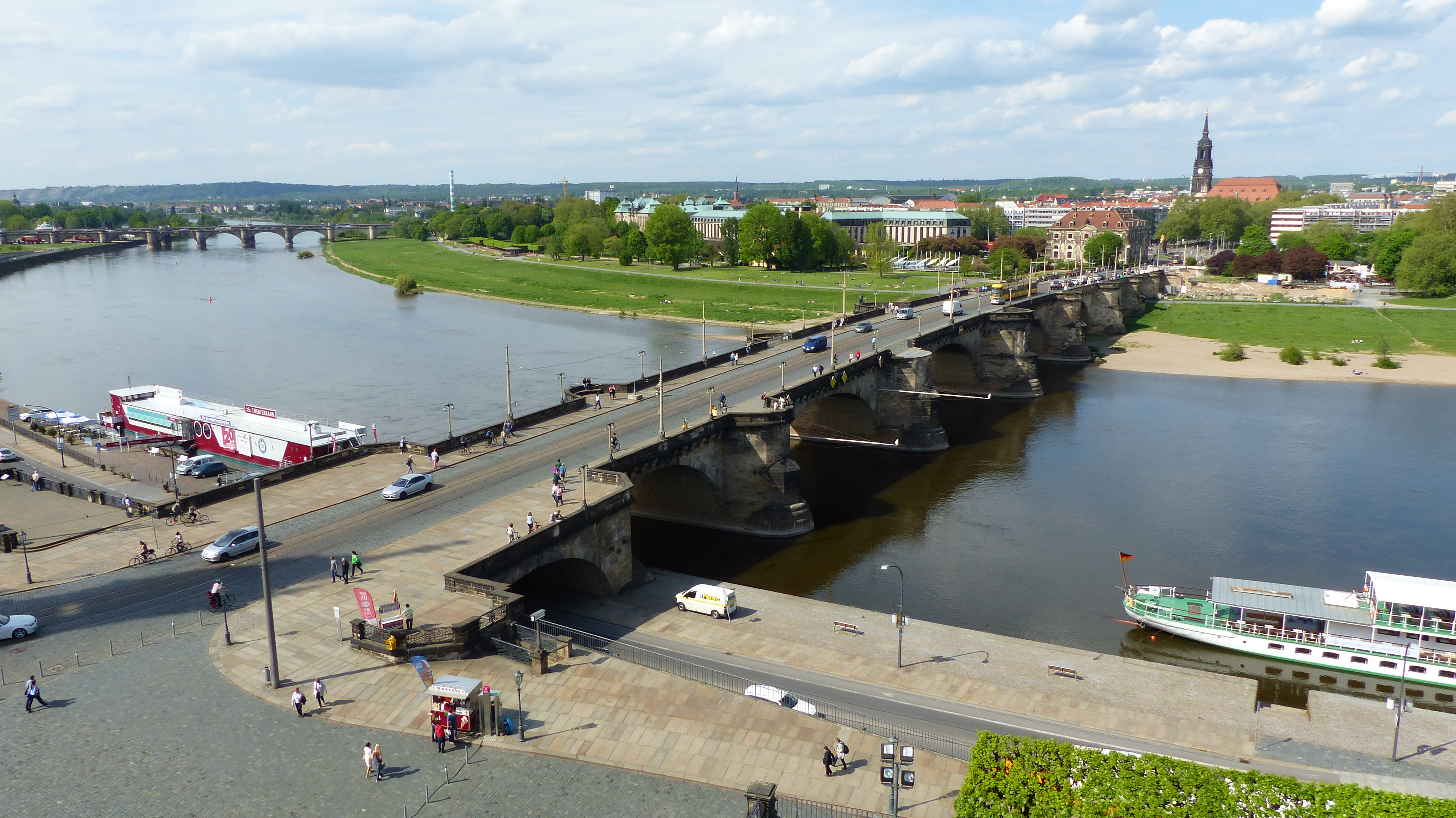 Blick auf Dresden vom Ständehaus (Landesamt für Denkmalpflege Sachsen) aus